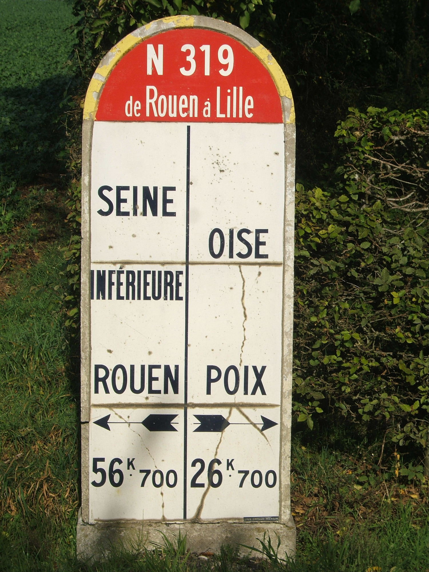 Borne interdépartementale sur la RN 319 entre la Seine-Inférieure et l'Oise / Milestone on the RN 319 between the Seine-Inférieure and the Oise départements